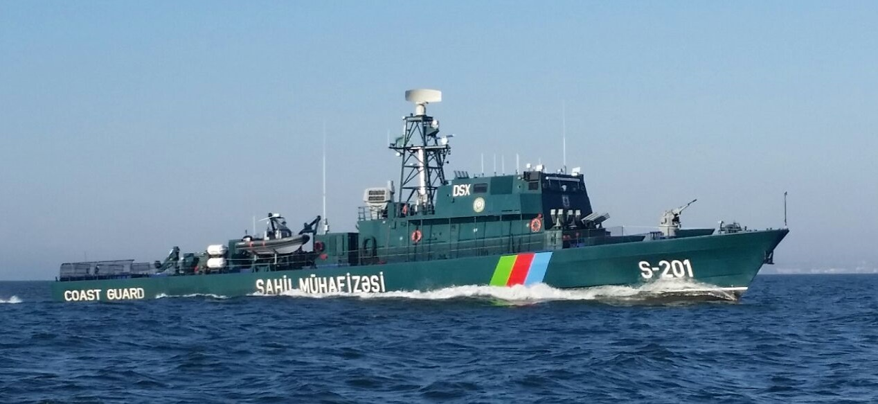 ספינת סיור 62 מ' משייטת בים הכספי